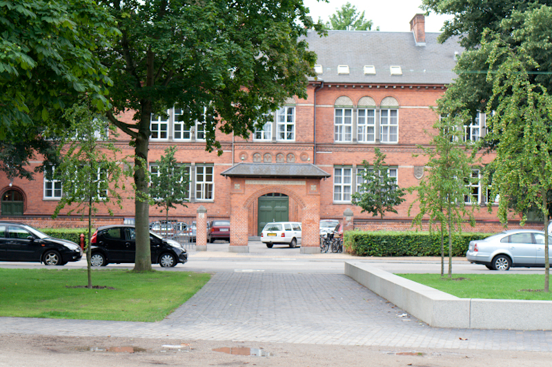 Katedralen set fra Kongens Have